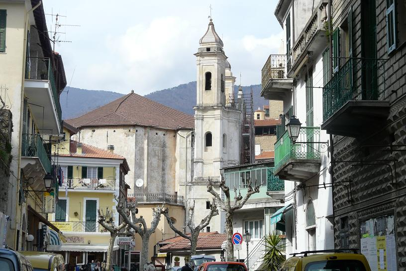 Chiesa dei Santi Pietro e Paolo, Ceriana, Liguria, Italia